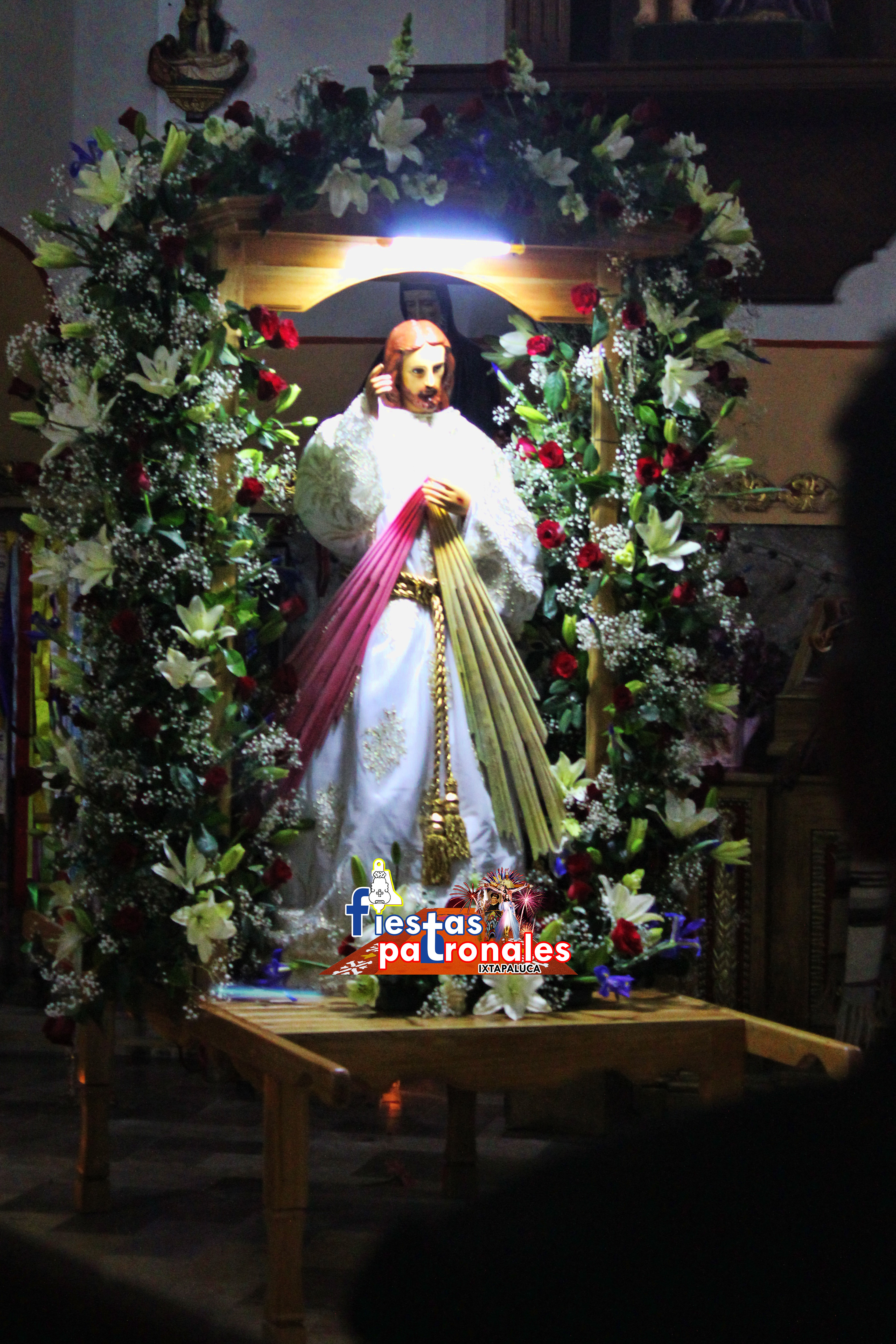 Fiesta de Ixtapaluca 2018 del Señor de la Divina Misericordia This image contains digital watermarking or credits in the image itself. The usage of visible watermarks is discouraged. If a non-watermarked version of the image is available, please upload it under the same file name and then remove this template. Ensure that removed information is present in the image description page and replace this template with metadata from image or attribution metadata from licensed image . Caution: Before removing a watermark from a copyrighted image, please read the WMF's analysis of the legal ramifications of doing so, as well as Commons' proposed policy regarding watermarks. If the old version is still useful, for example if removing the watermark damages the image significantly, upload the new version under a different title so that both can be used. After uploading the non-watermarked version, replace this template with superseded|new filename|version without watermarks .